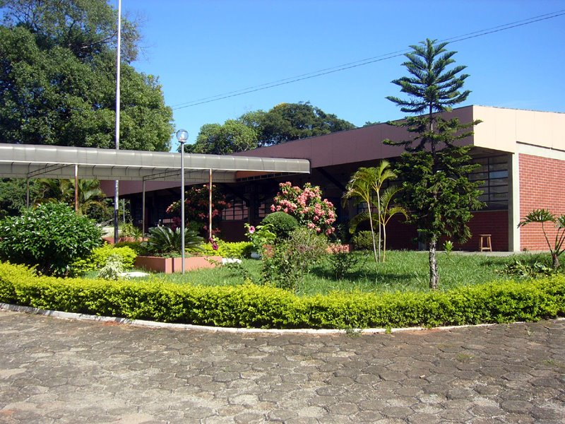 Foto do Colégio Técnico Industrial - CTI (Bauru)